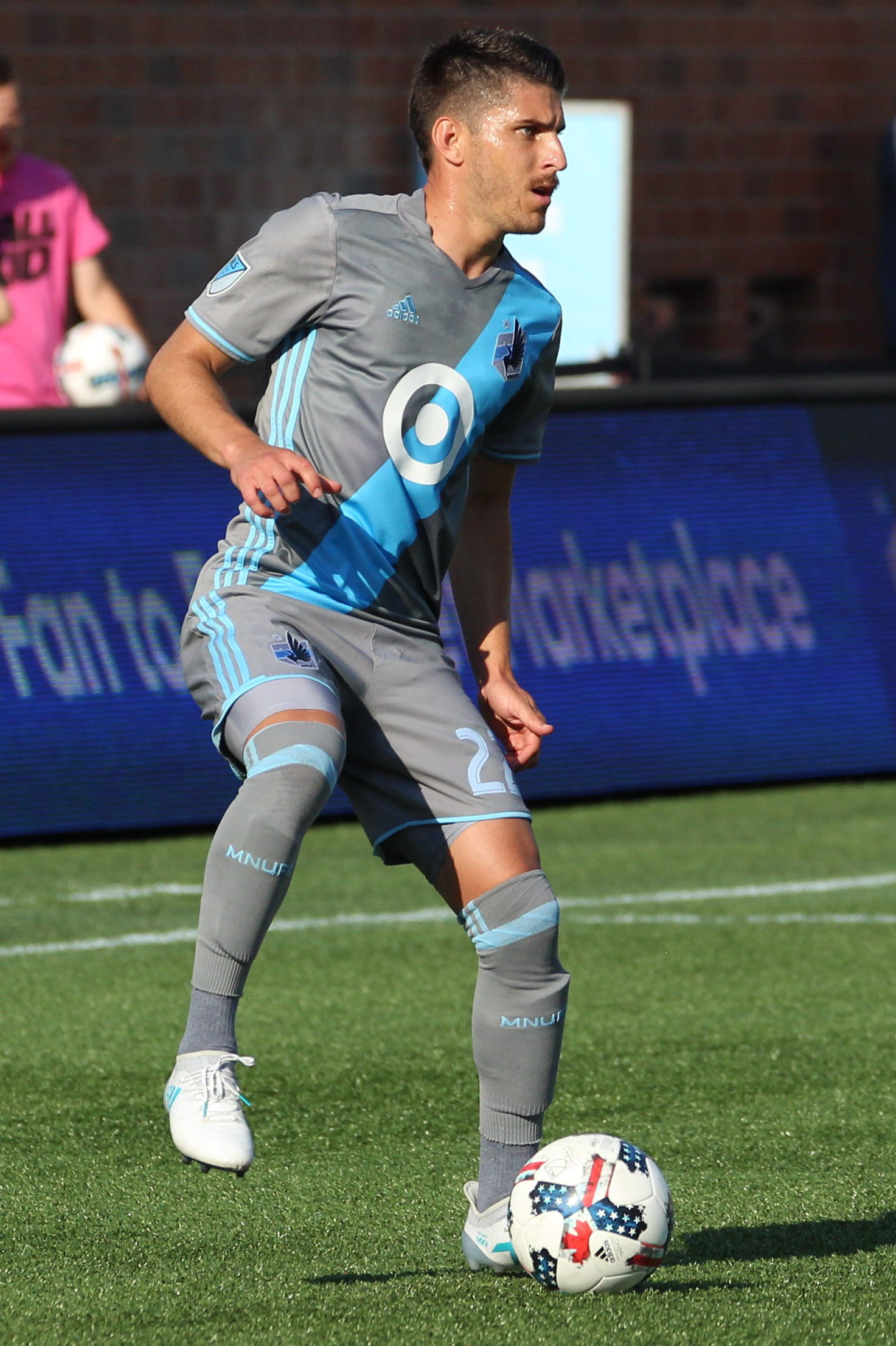 Kevin Venegas - MLS - MN UNITED